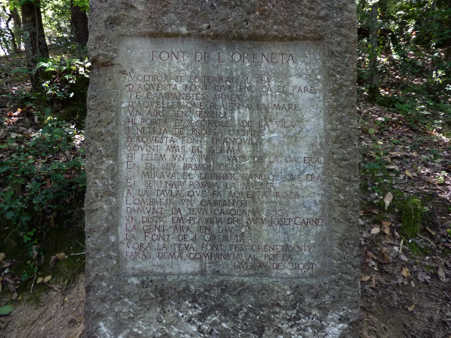 Estela amb una poesia de Guerau de Liost a la Font de l'Oreneta, al Montseny (Viladrau, Catalunya)